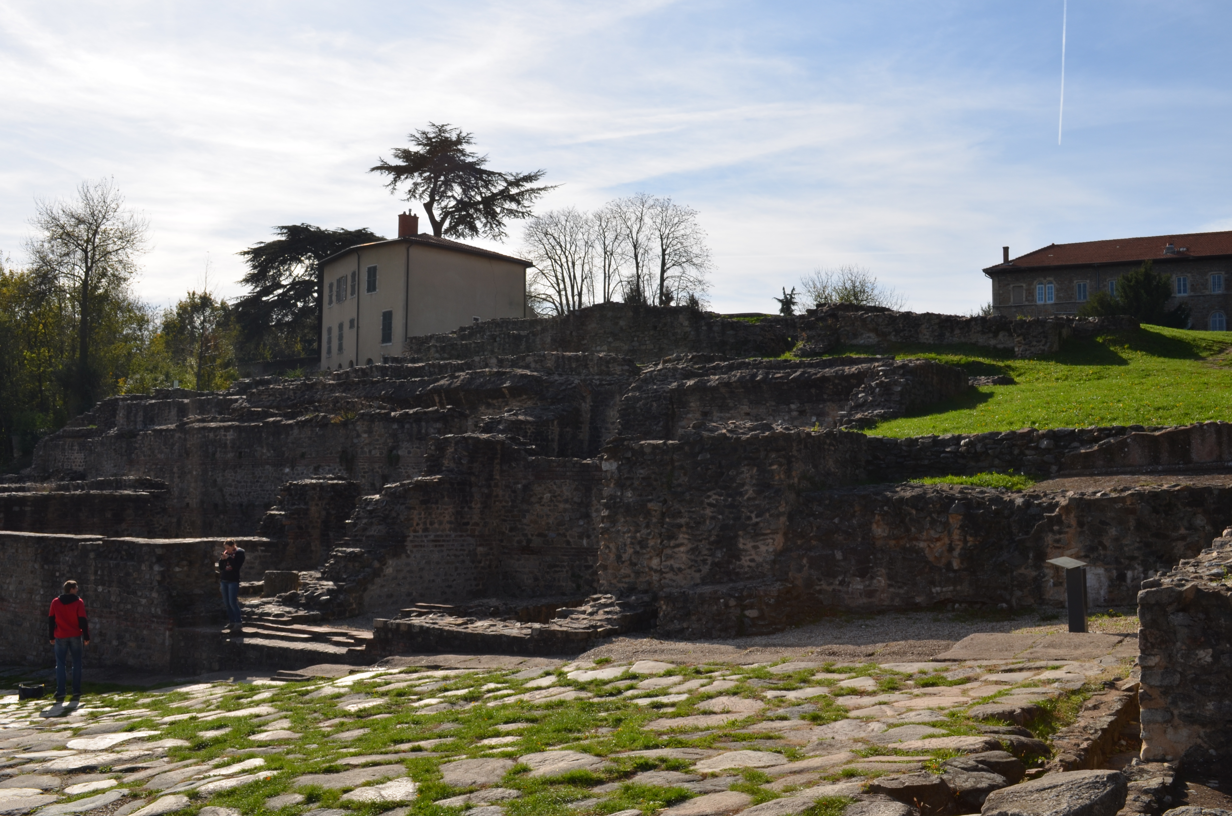 Voie romaine et pseudo sanctuaire de Cybèle, Lyon, France.